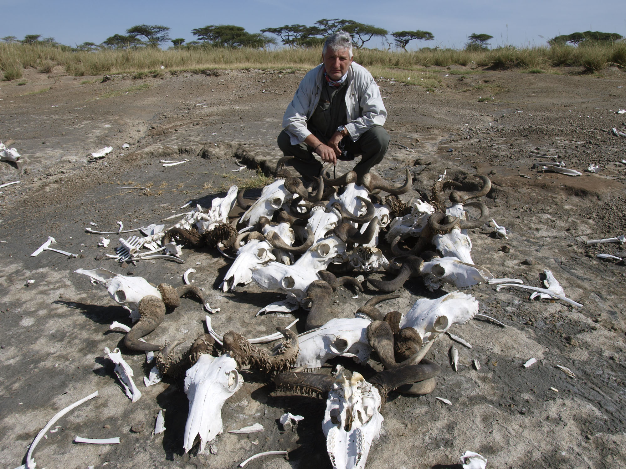 Enrique Baquedano junto a cráneos de ñus en la Garganta de Olduvai. (Tanzania) Junio de 2012. Foto tomada por Javier Trueba